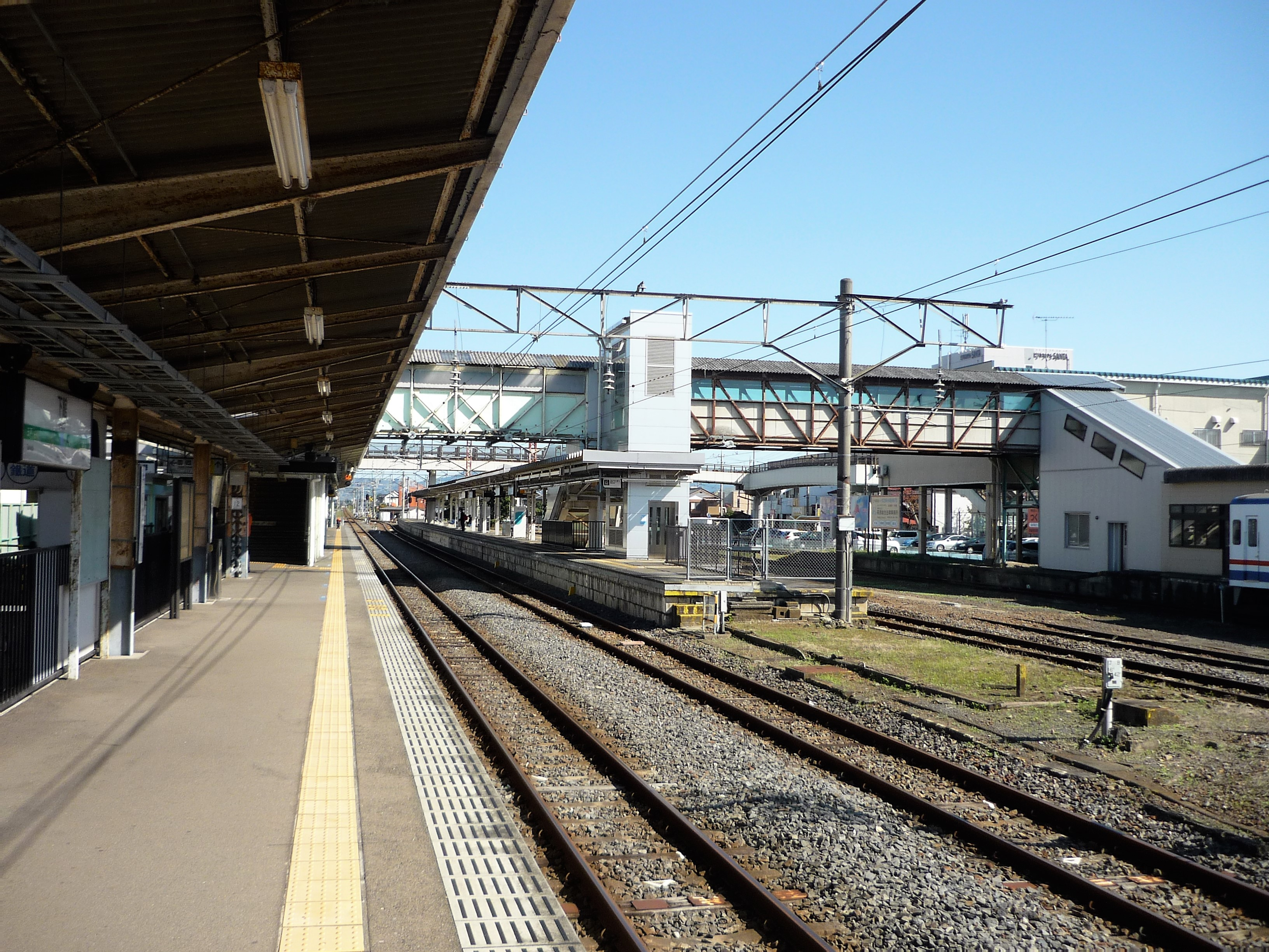 下館駅ホーム（左が2番線、真ん中が3・4番線、右が常総線ホーム） Panasonic Lumix DMC-FS3